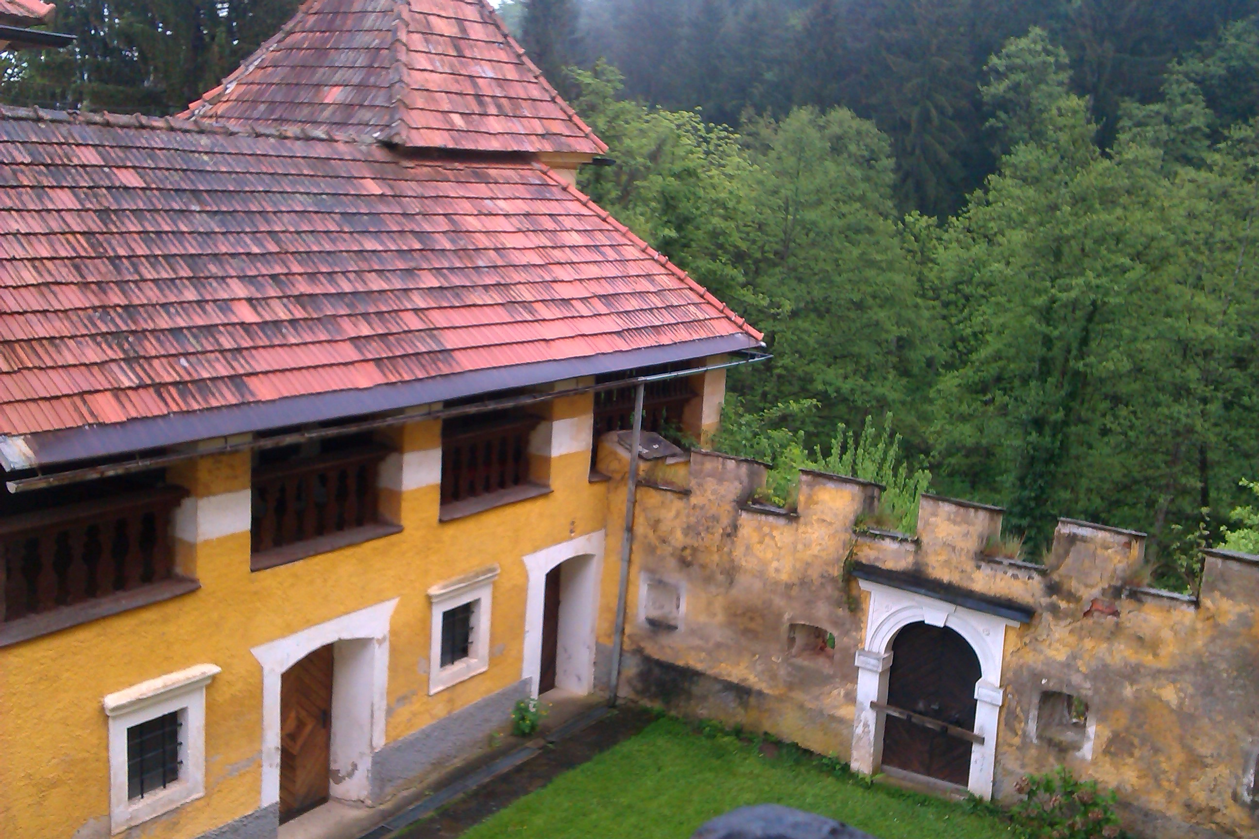 Schloss Limberg bei Wies, Torgebäude Seitenflügel